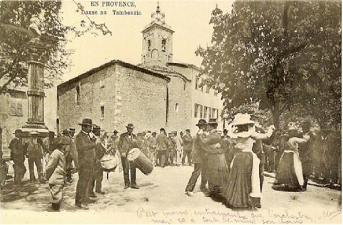 Tambourinaires lors d'un bal à Fréjus